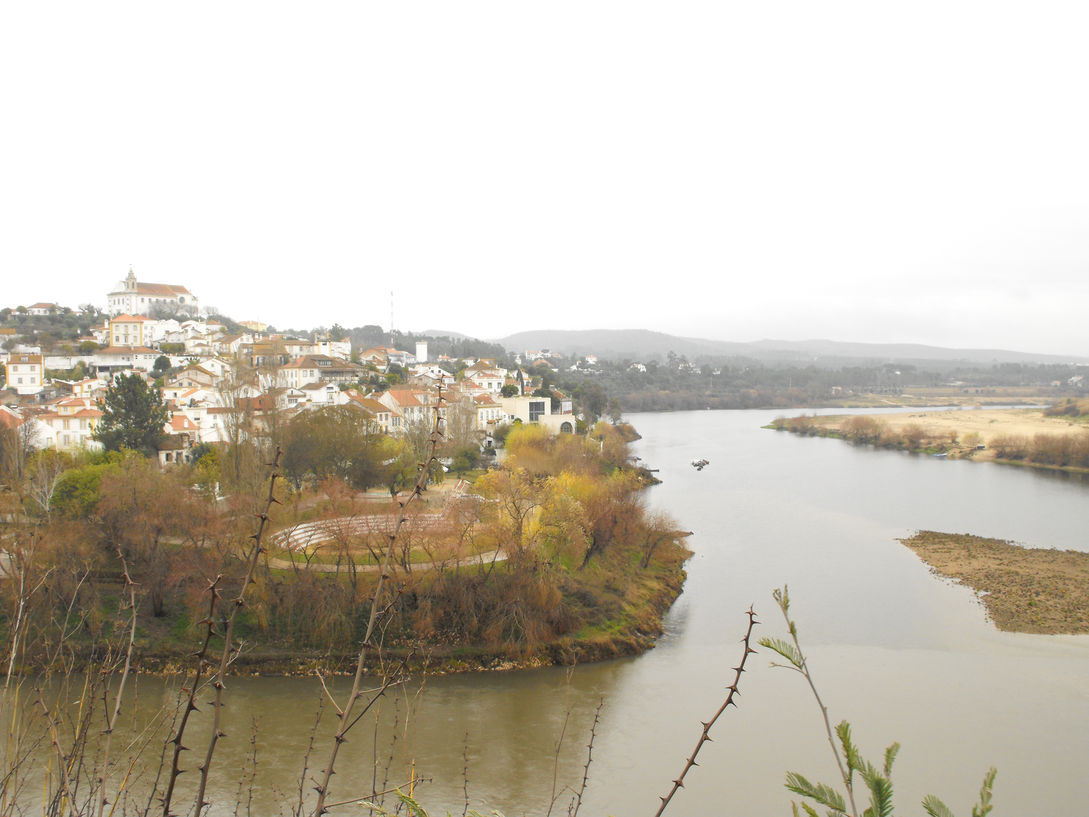 Constância - Portugal